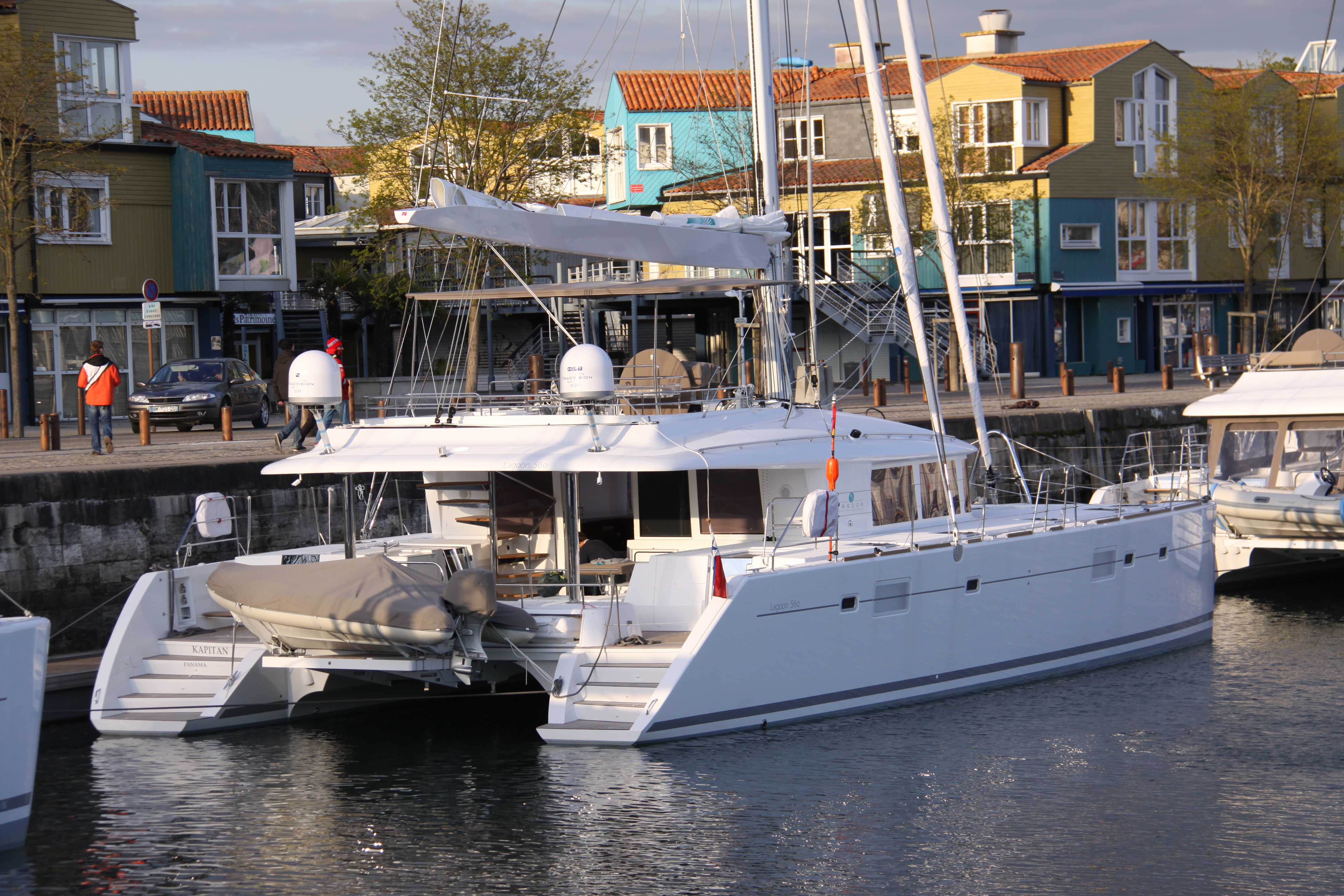 Dans le Bassin des Chalutiers, lors du salon nautique Bateaux Passion, un catamaran de croisière Lagoon 560. Quelques caractéristiques du Lagoon 560: catamaran de croisière de série, année le lancement de la série: 2010, longueur hors tout: 17,07 mètres, largeur hors tout: 9,44 mètres, tirant d' eau: 1,50 mètres, surface de voile au près: 207 m2, gasoil: 1300 litres, homologué pour 14 personnes. La Rochelle, Charente Maritime, France.